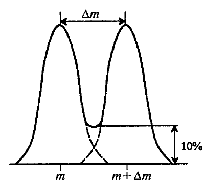 Разрешение двух пиков гауссовой формы на хроматограмме.